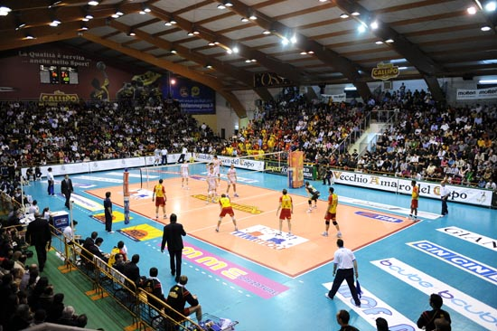 Partita di Serie A1 al PalaValentia tra Tonno Callipo Vibo Valentia e Marmi Lanza Verona